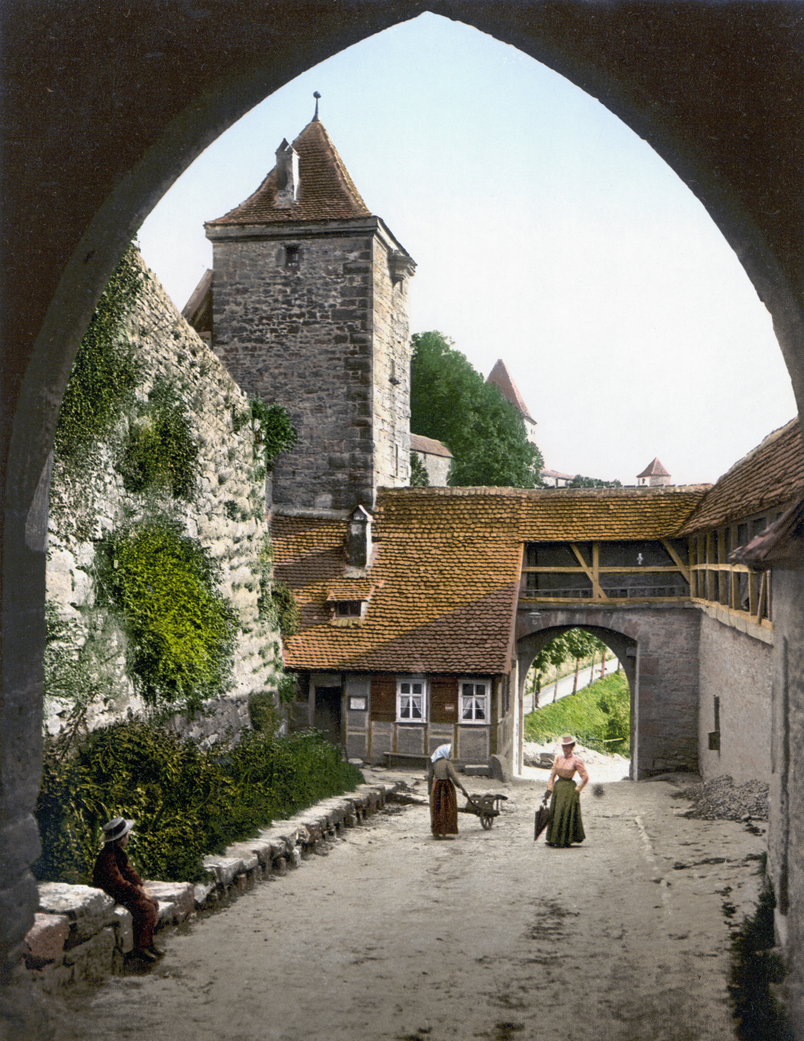 Rothenburg um 1900